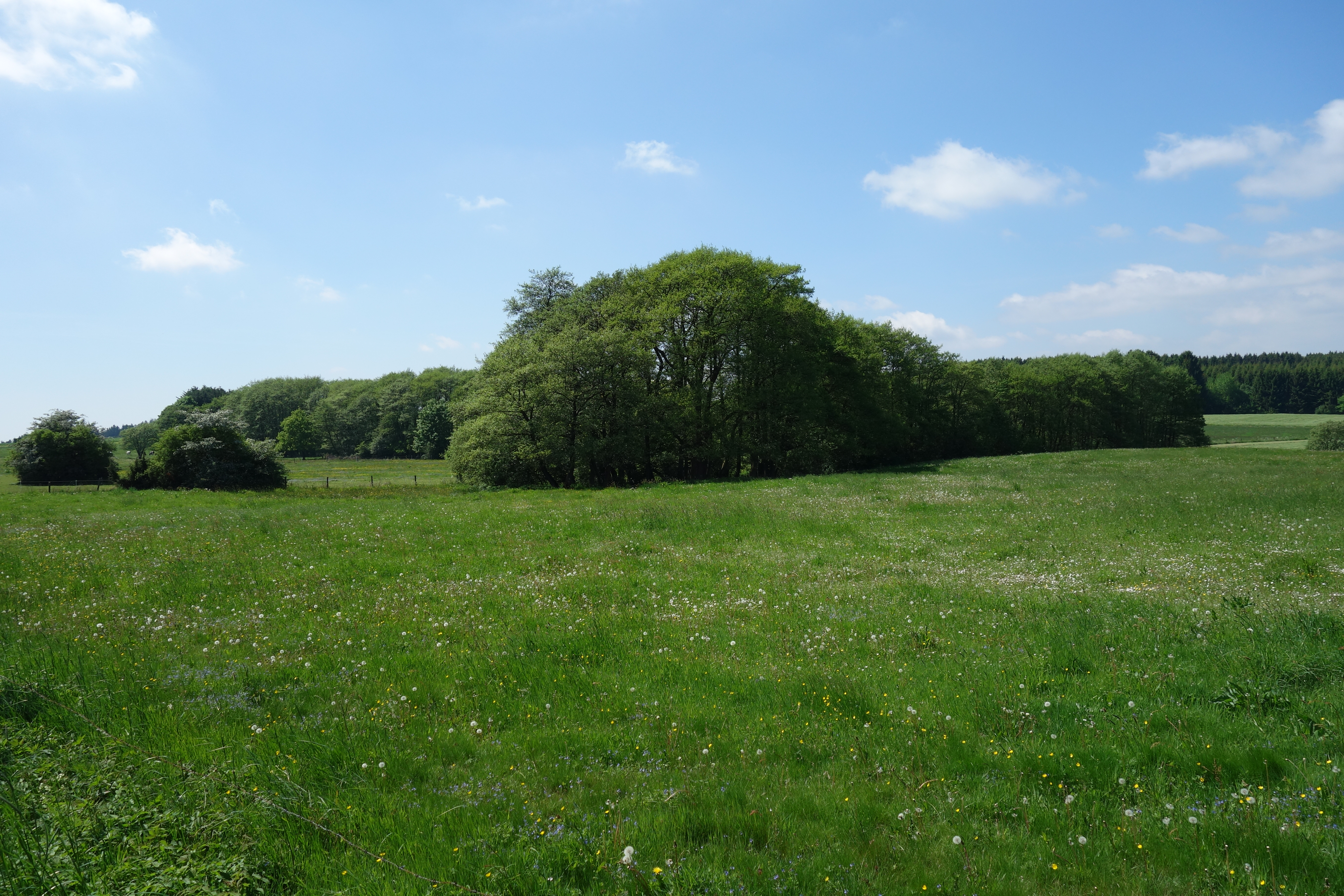 Naturschutzgebiet Brüche: Im Bild ist Erlenwaldbereich im Norden des NSG zu sehen.